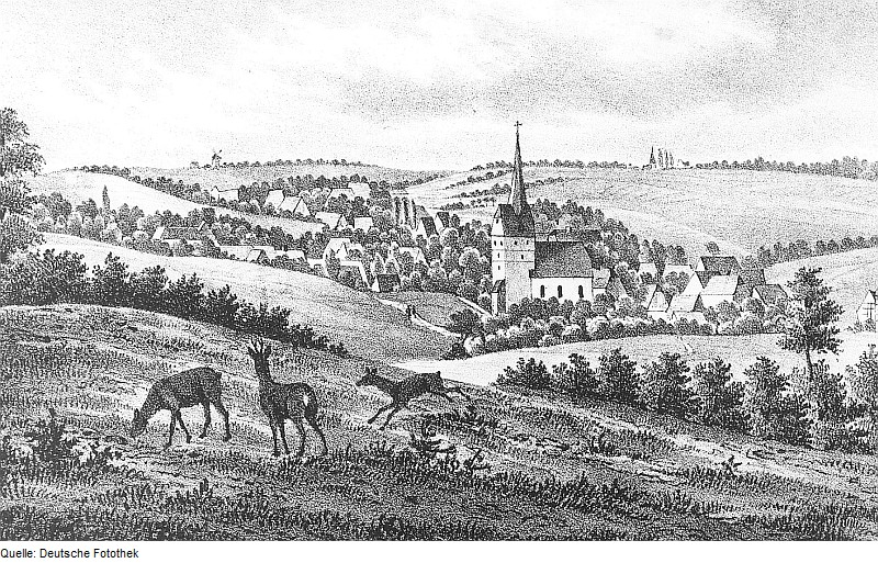 Original image description from the Deutsche Fotothek Thonhausen. Ortsansicht